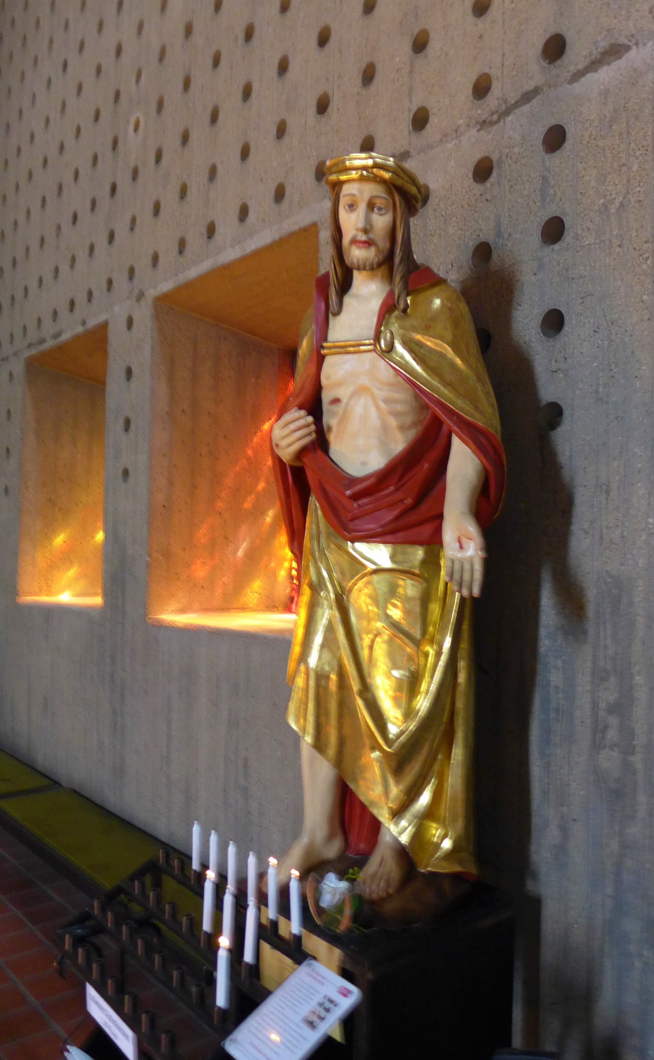 St. Ludwig (Saarlouis), Jesus-Statue